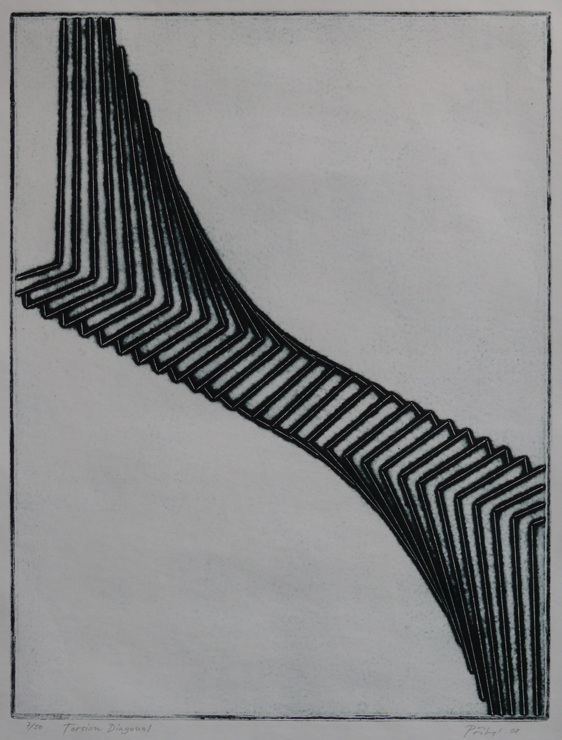 Lubomír Přibyl, TORSNÍ DIAGONÁLA , kolografie 2008